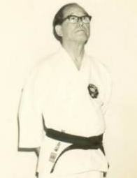 Shōshin Nagamine en octubre de 1978, Uruguay.